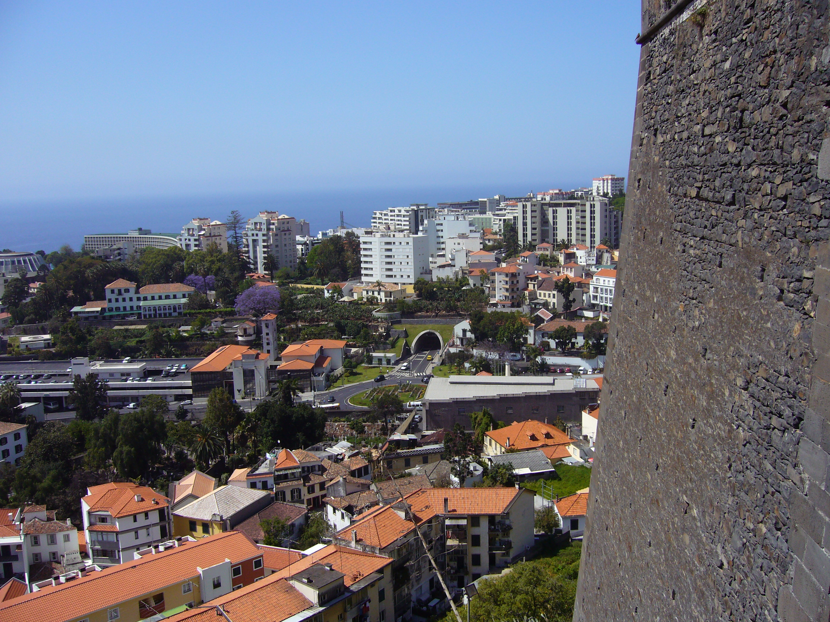 View from Fortaleza do Pico in Funchal